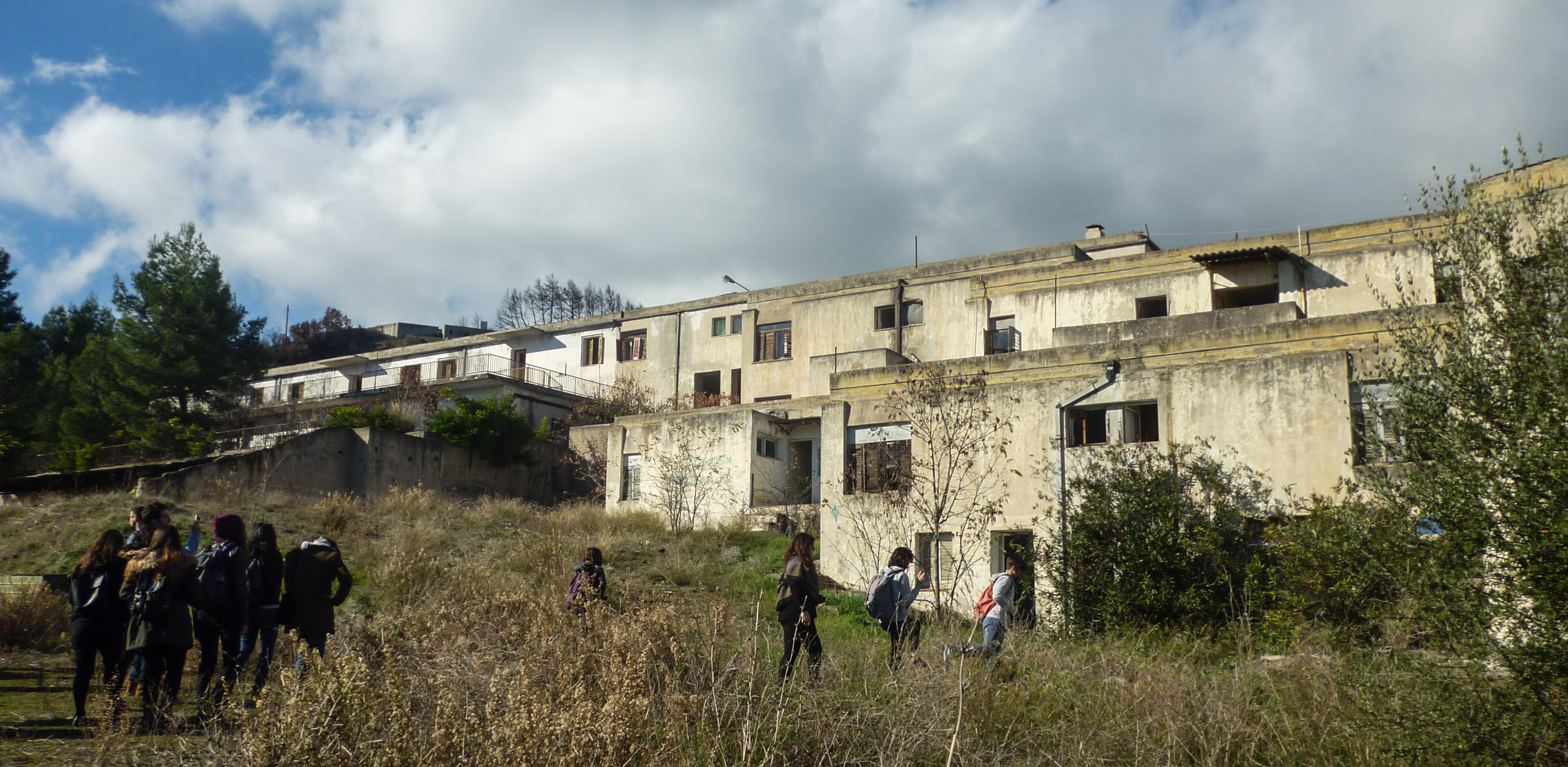 άποψη του οικισμού Μπάρλου στο Δίστομο